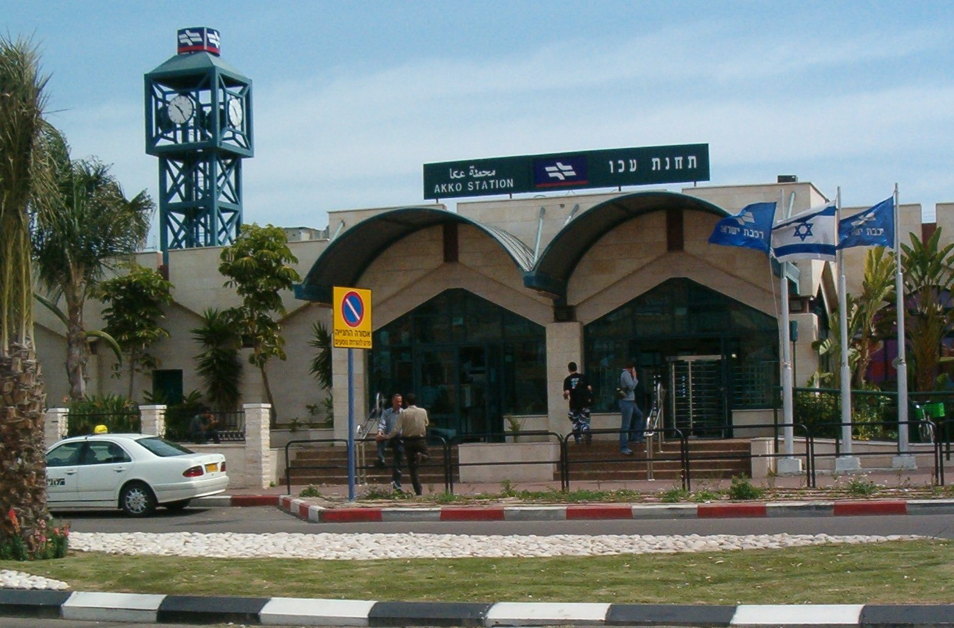 חזית מבנה תחנת הרכבת עכו